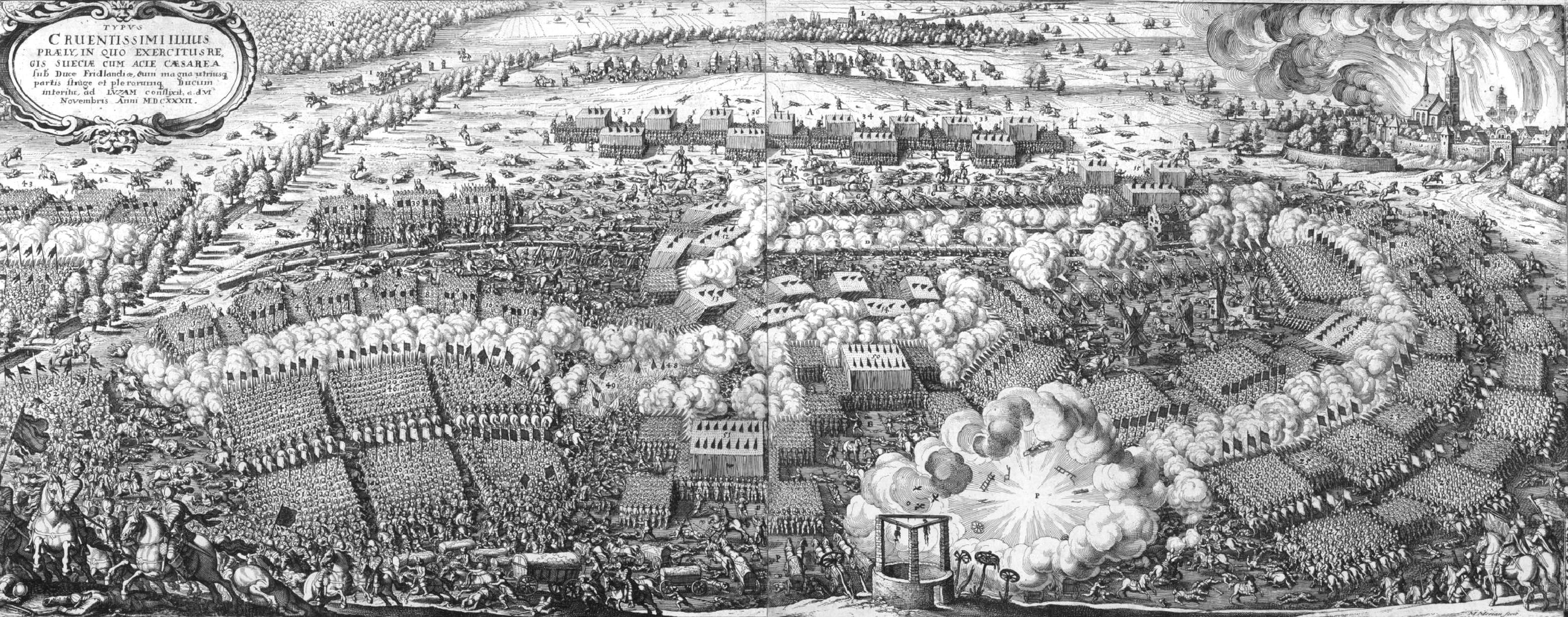 Digitalisat der Bayrischen Staatsbibliothek München; Ausschnitt. Abbildung der Schlacht so bey Lützen den 6. Novemb. 1632. Geschechen in Wikisource